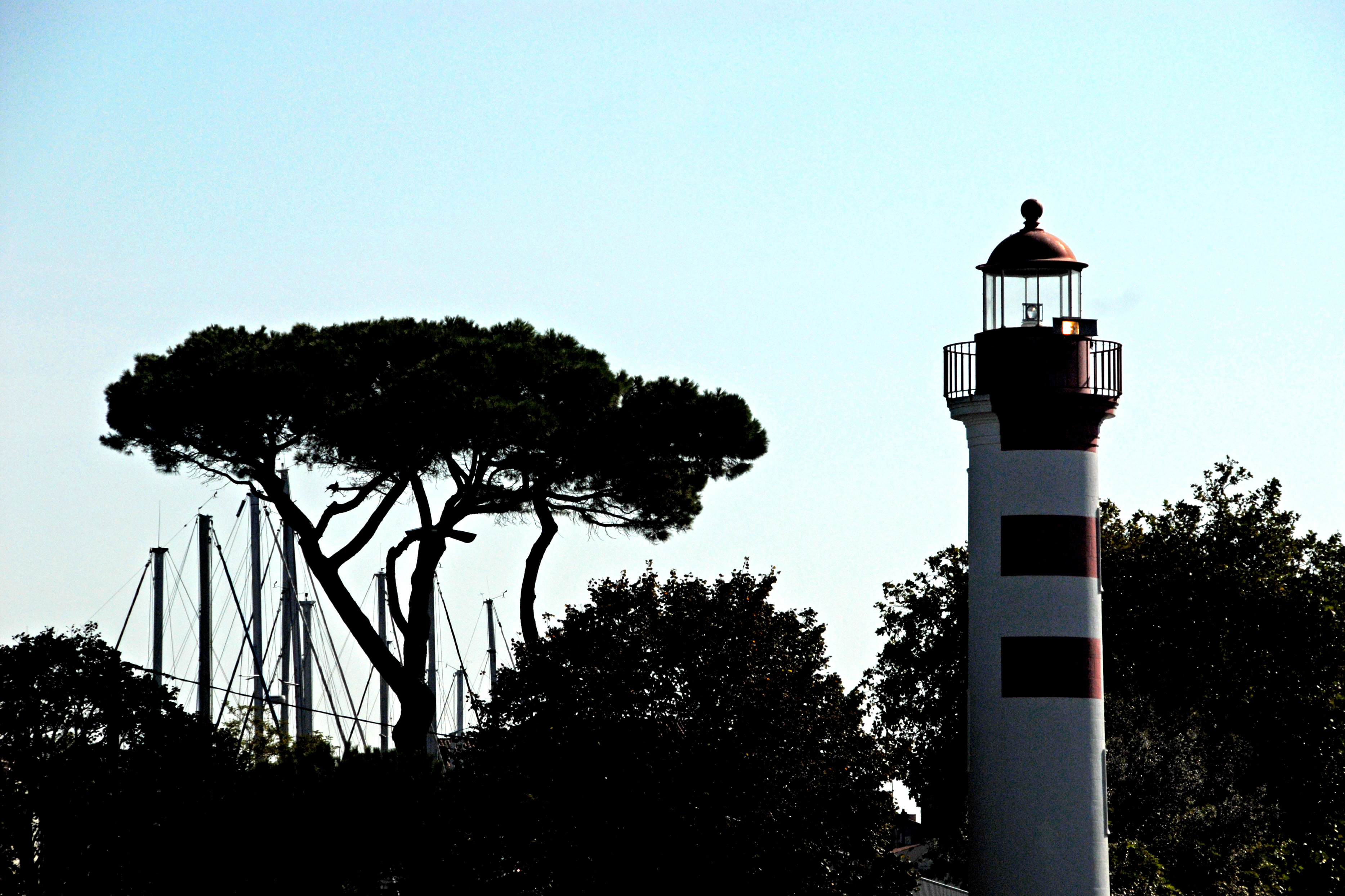 La Rochelle, Leuchtturm und Pinie